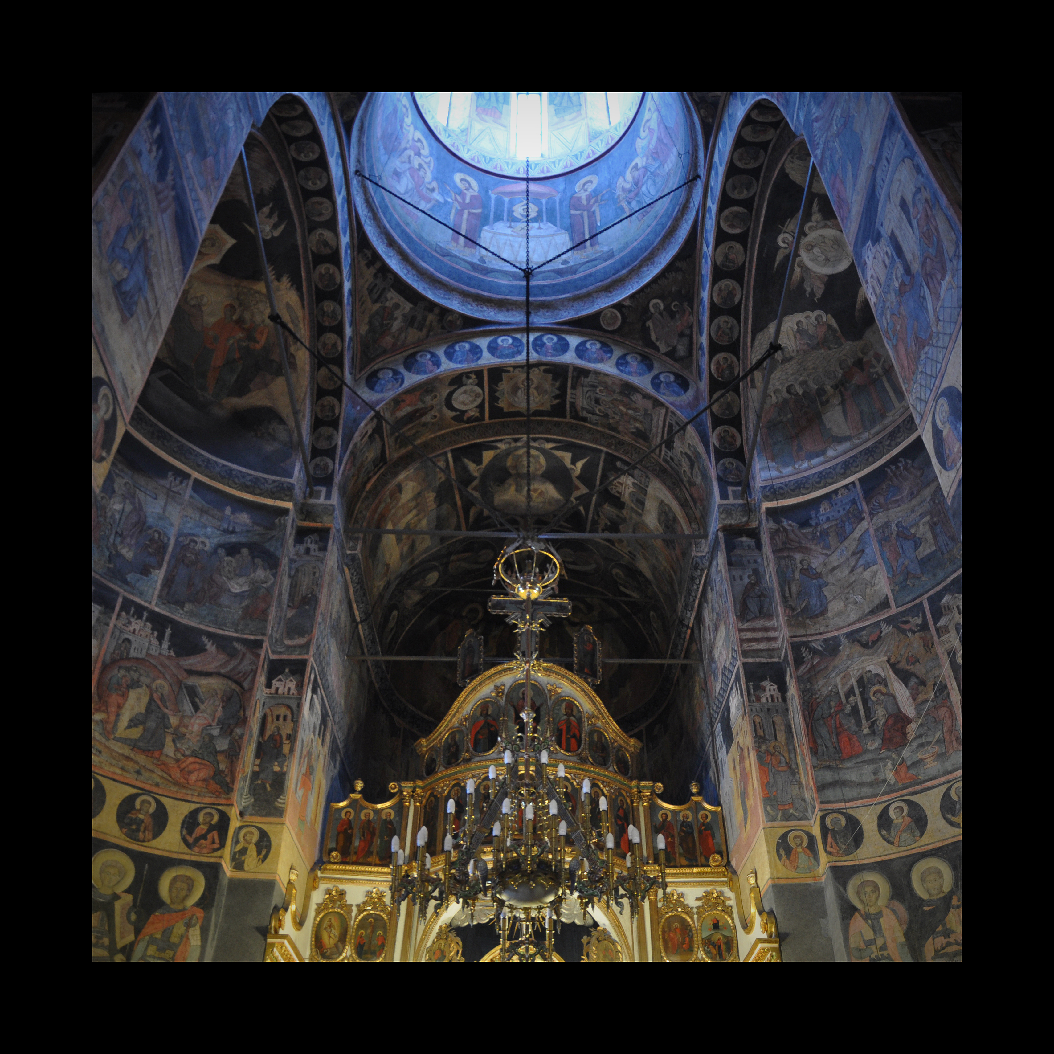 Biserica Sf. Nicolae [Creţulescu], Bucuresti Kretzulescu church, Bucharest